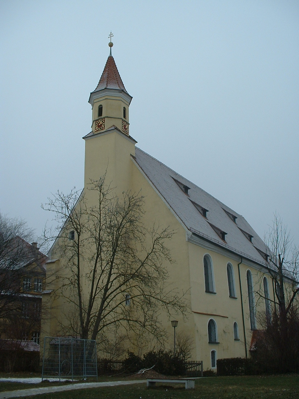 Söflingen Abbey, church